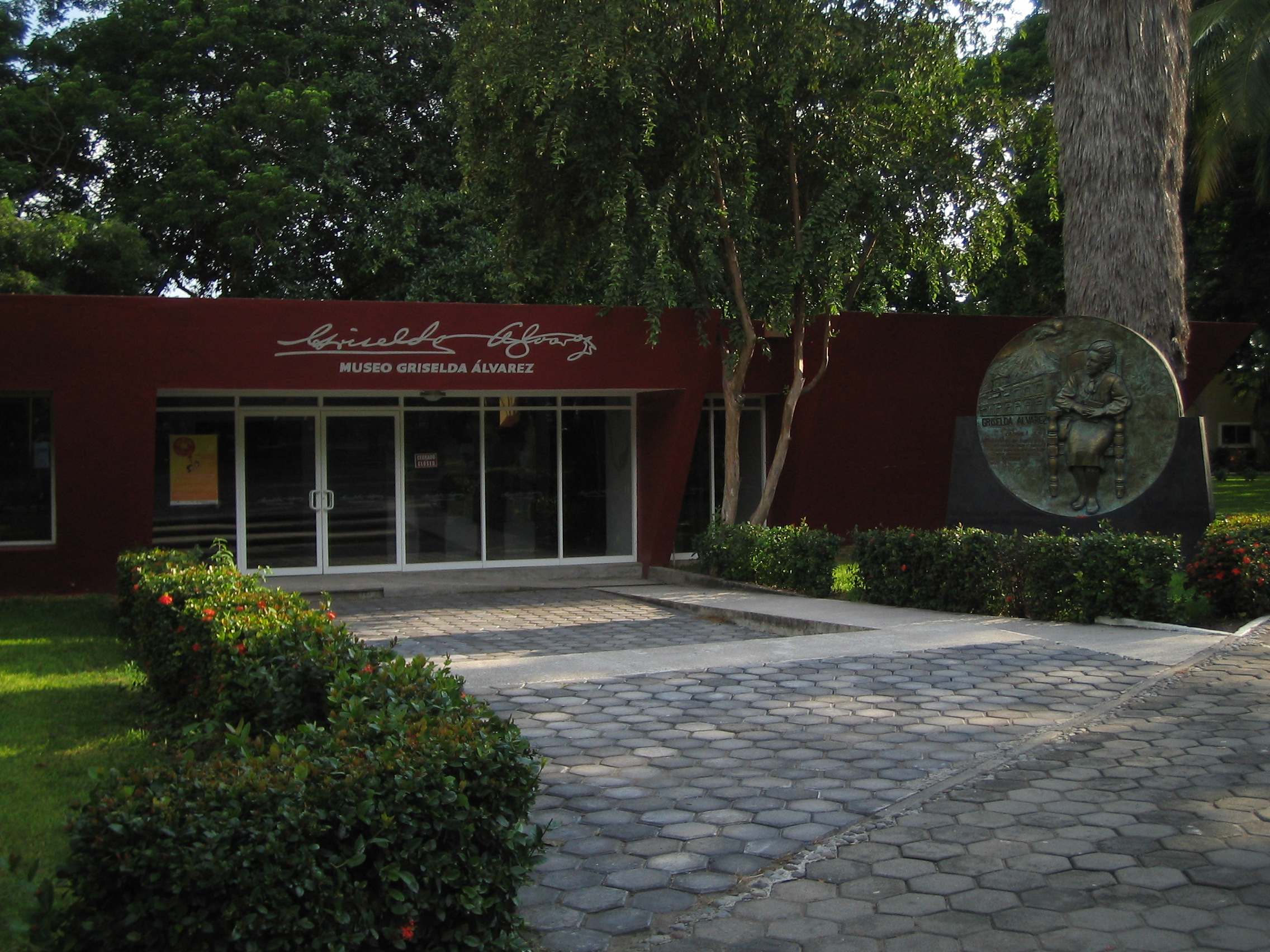 Museo Griselda Alvarez